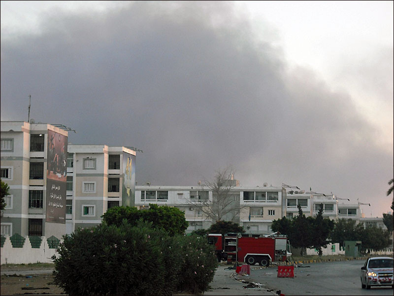 [Magharebia/Essam Mohamed] Smoke rises over Abu Slim, Tripoli, one of the last areas of the capital to be freed by revolutionaries. تصاعد الدخان فوق أبو سليم، طرابلس واحدة من آخريات مناطق العاصمة التي يحررها الثوار De la fumée s'élève au dessus d'Abou Slim, l'une des dernières zones de la capitale à avoir été libérée par les révolutionnaires, à Tripoli.